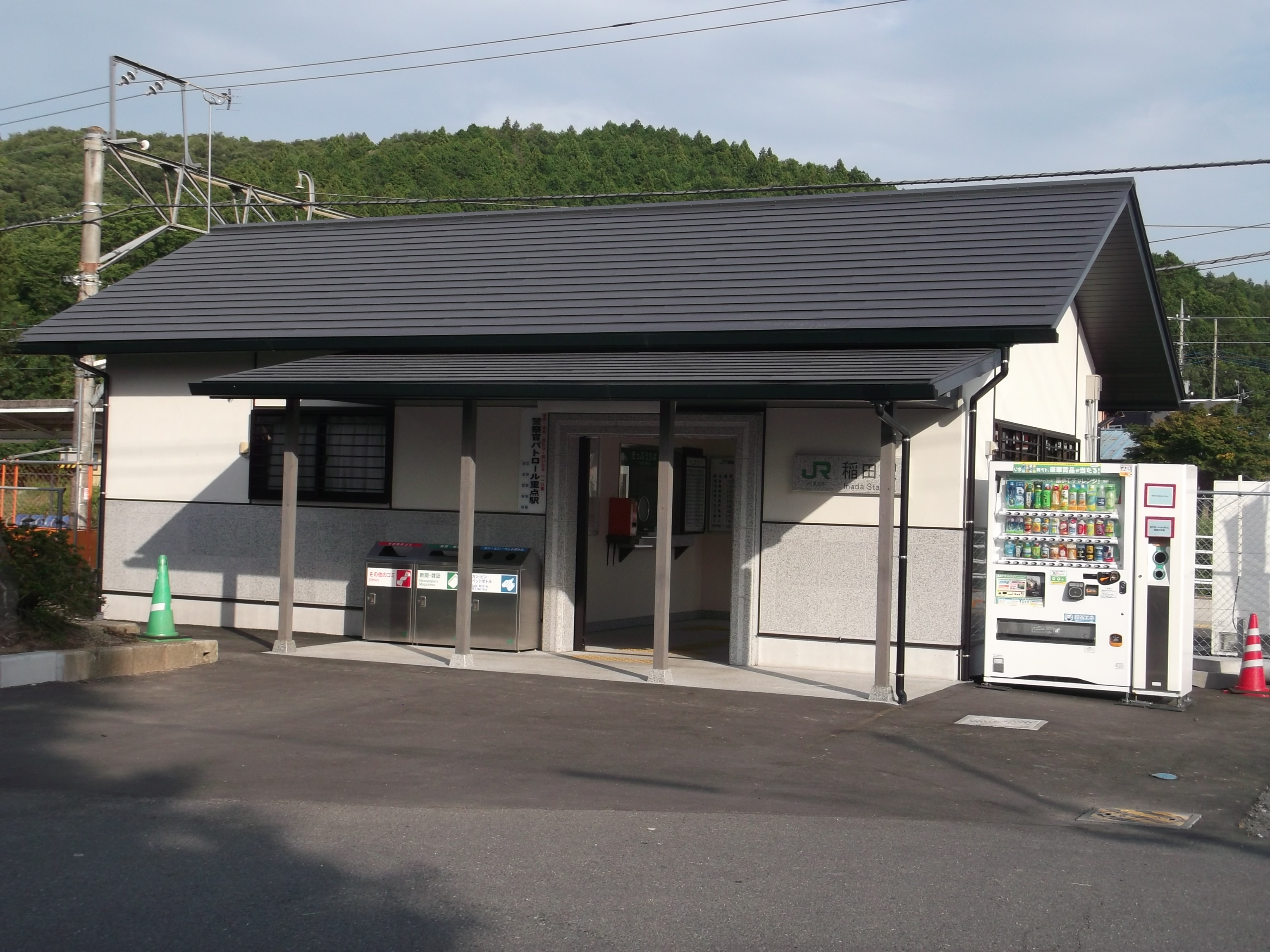 JR水戸線 稲田駅駅舎